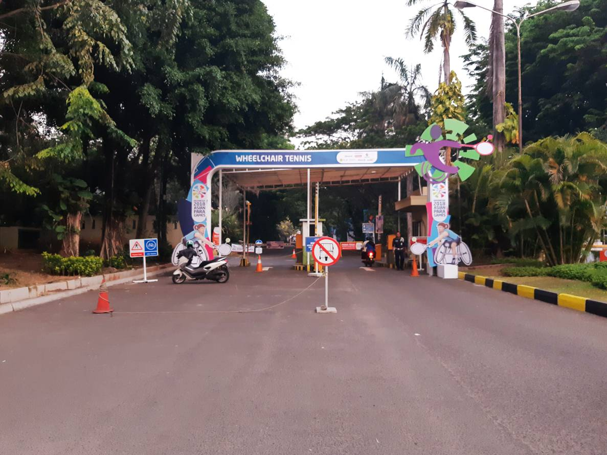 Klub Kelapa Gading saat penyelenggaraan Asian Para Games 2018